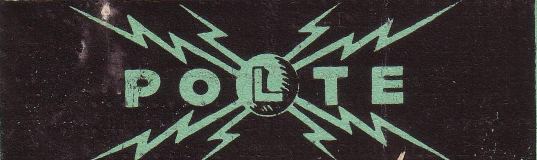 Logo der Polte Patronenfabrik oder Patronenproduktion